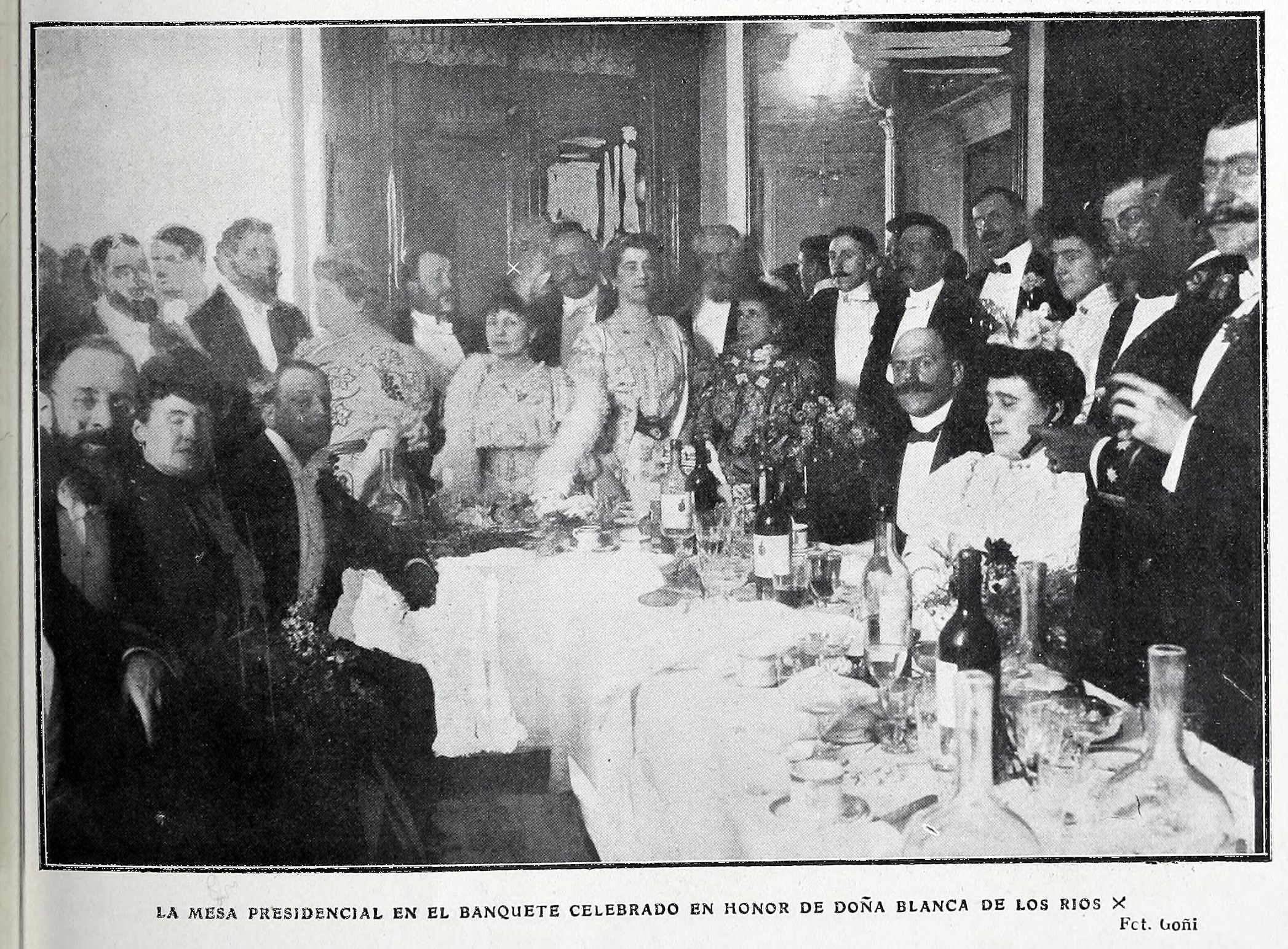 La mesa presidencial en el banquete celebrado en honor de doña Blanca de los Ríos.